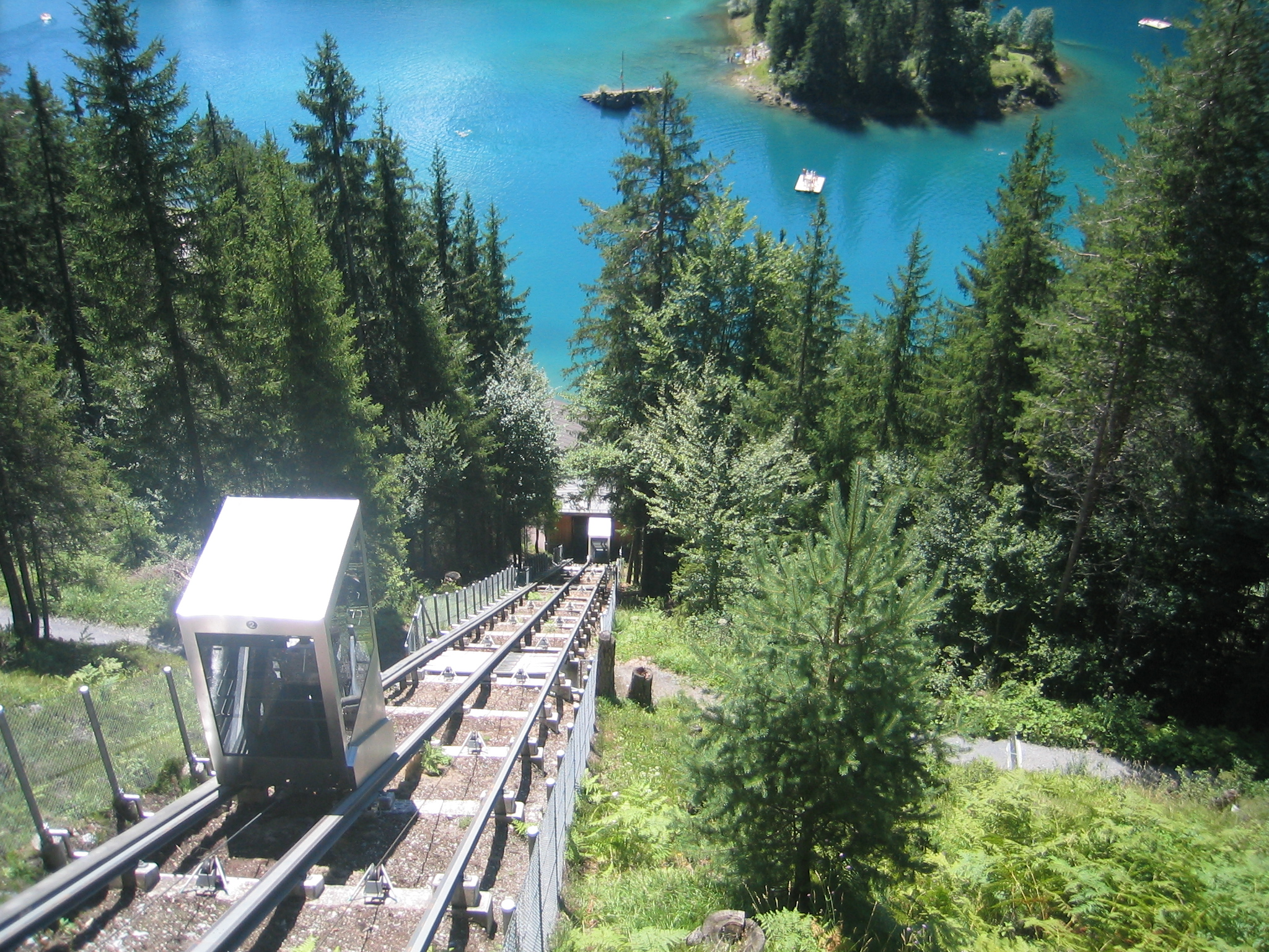 Standseilbahn Caumasee/Flims